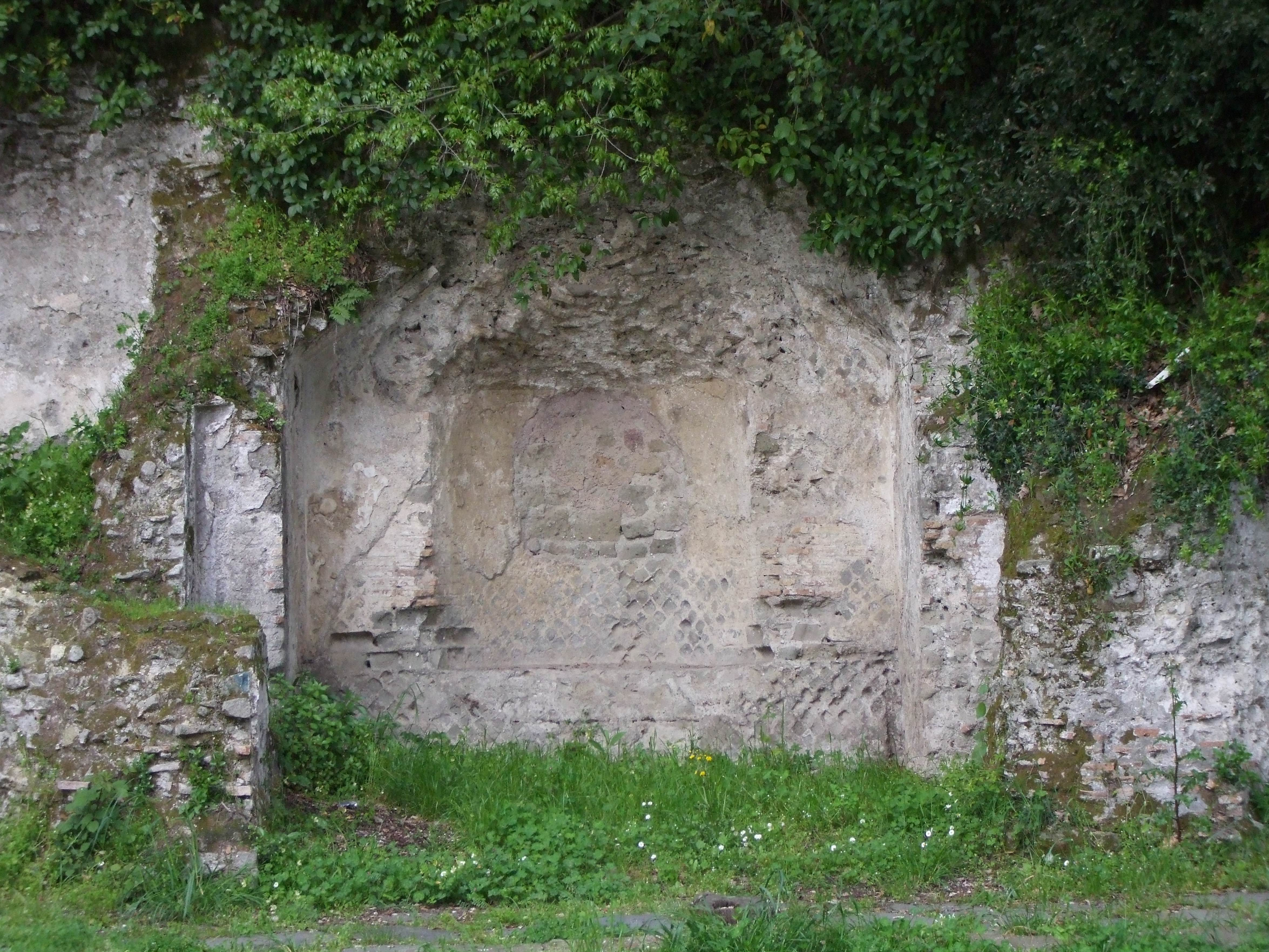 Villa di Gneo Pompeo Magno a Villa Doria ad Albano Laziale - Particolare.